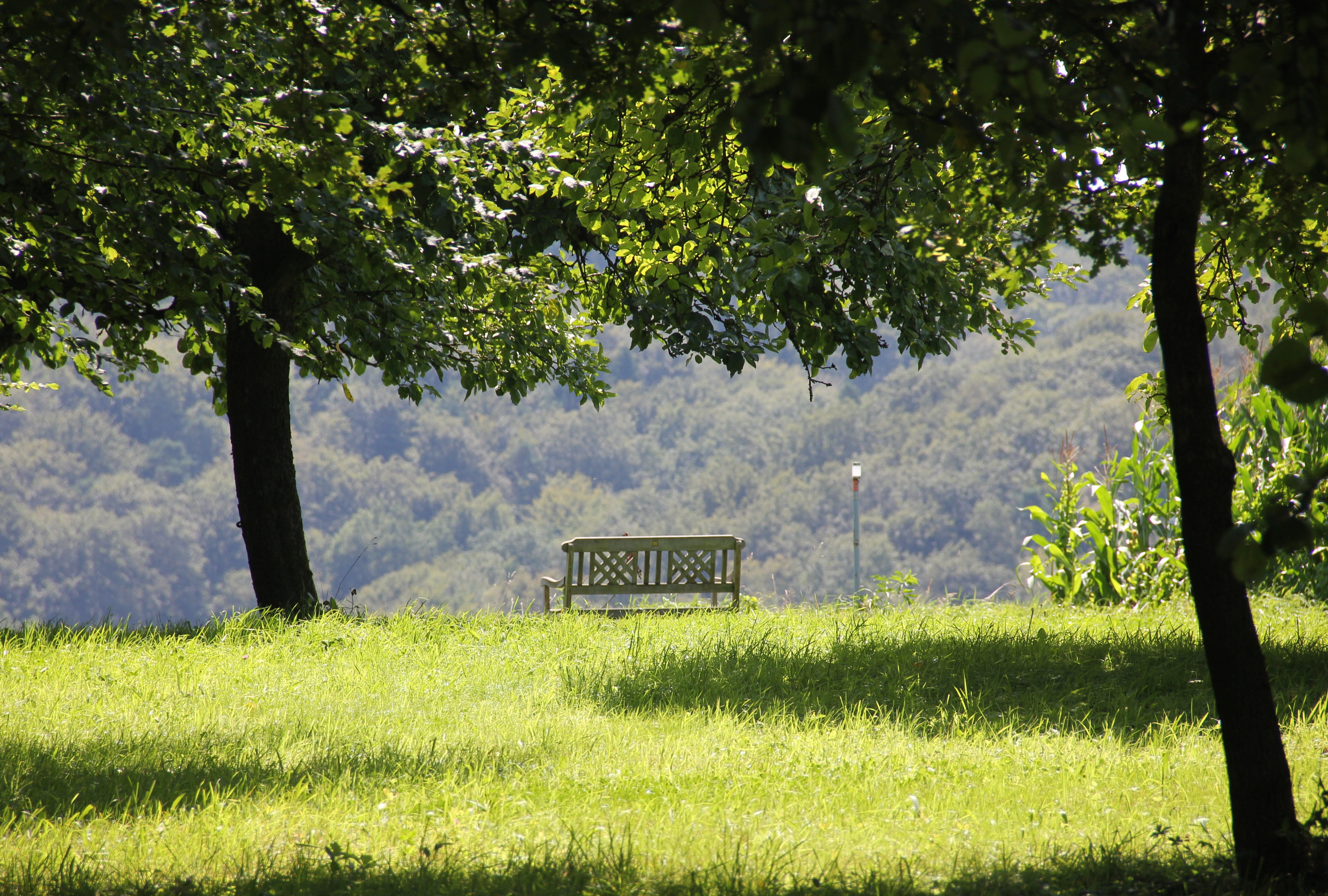 Bank mit Blick über das Tal eines Nebenbaches der Naaf auf dem Rundwanderweg des Sauerländischen Gebirgsvereins - Bezirk Bergisches Land e. V. (SGV) von Höffen (Lohmar) ins Naafbachtal; Naturpark Bergisches Land